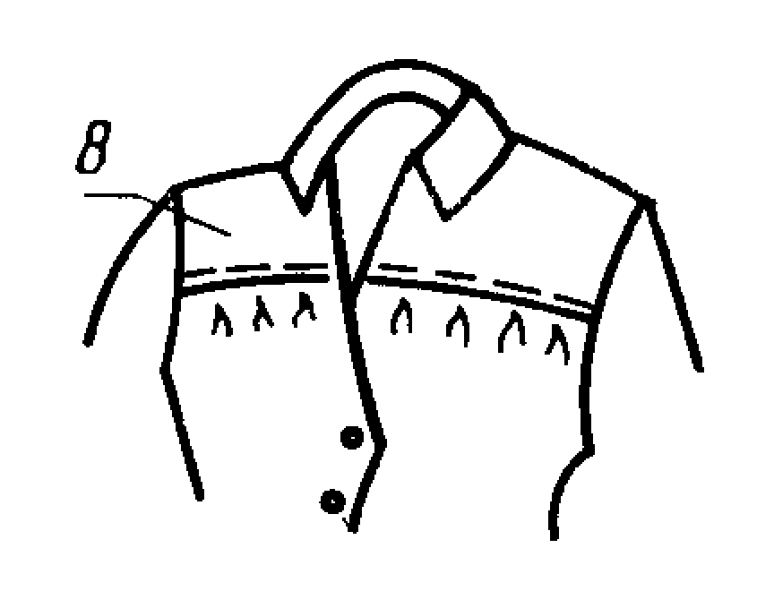 Изображение из ГОСТ 22977-89 (СТ СЭВ 6484-88) — Детали швейных изделий. Термины и определения.